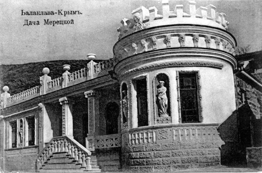 Meretskaya's Palace